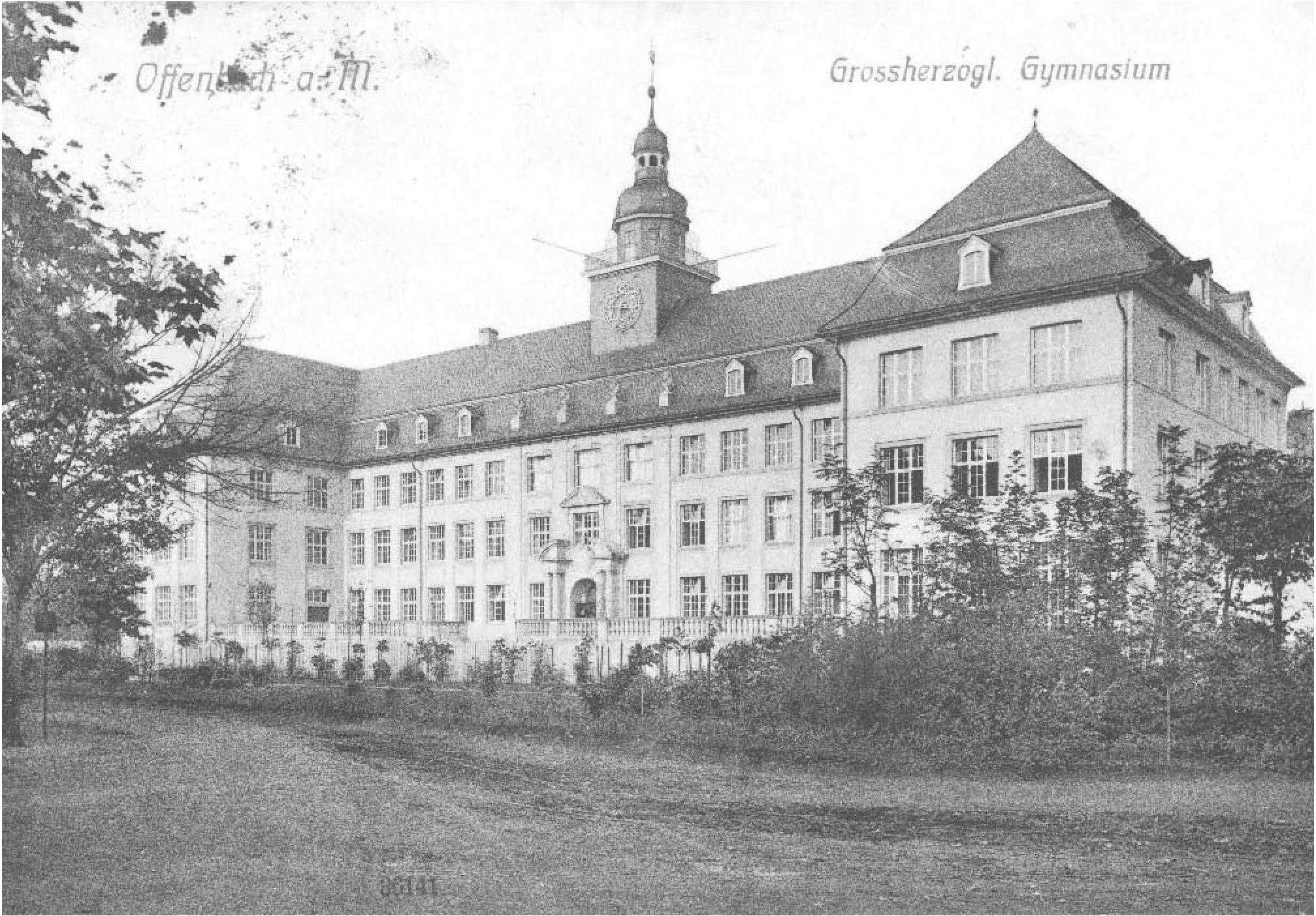 Offenbach am Main Gymnasium, heute Leibnitzschule